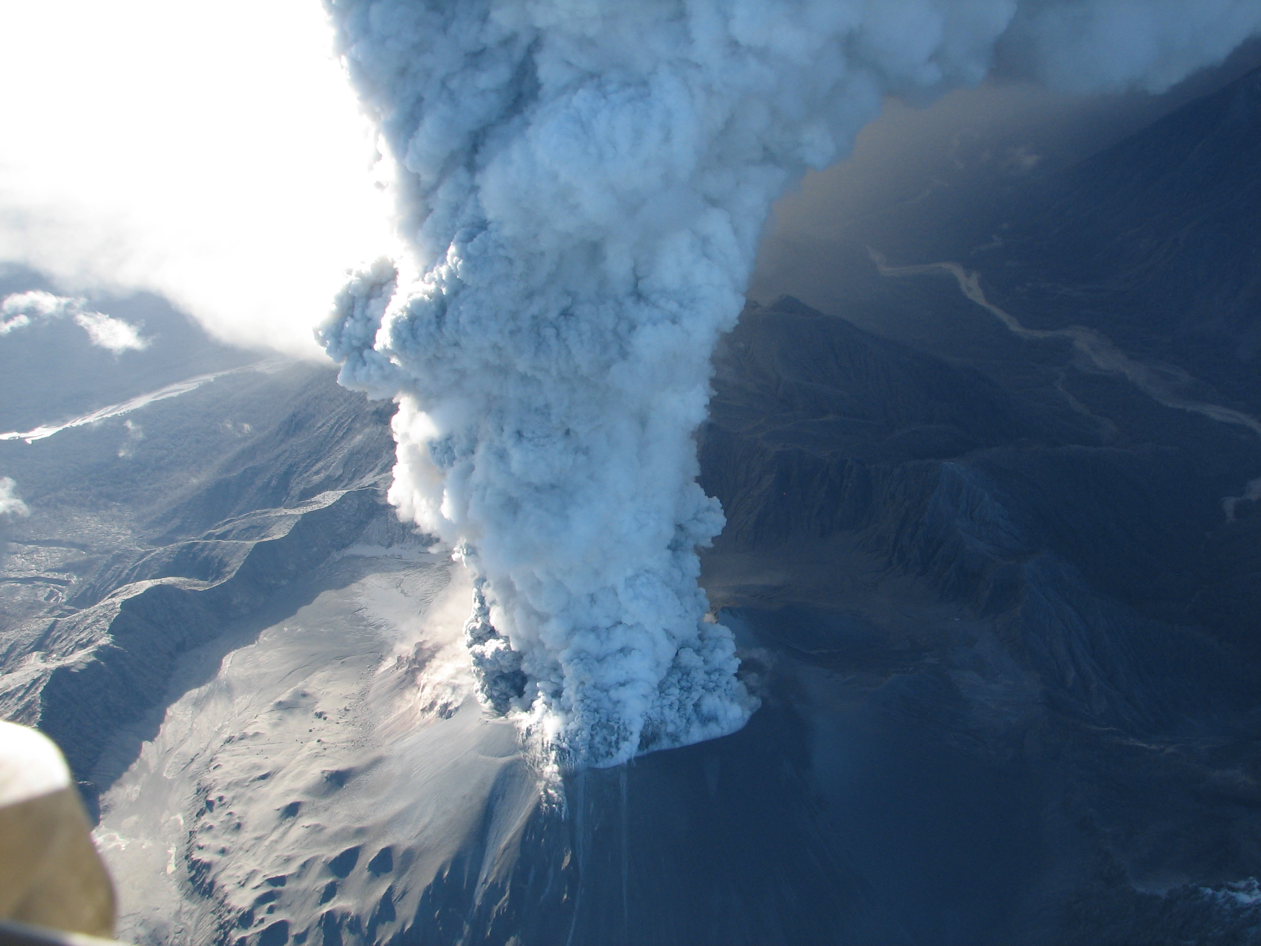 Columna de cenizas de la erupción del Chaitén de 2008, tomada el 27 de mayo de ese año.